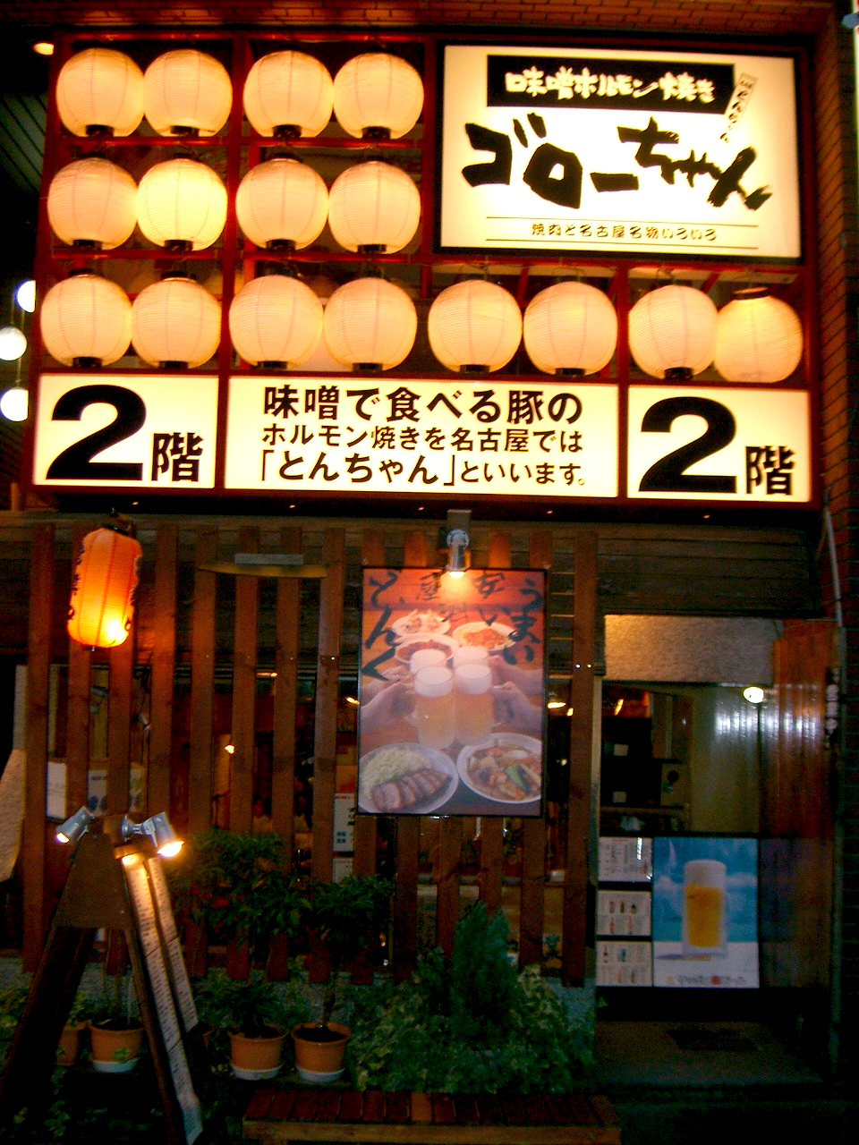 Sean Wilson, 2005, Koenji.